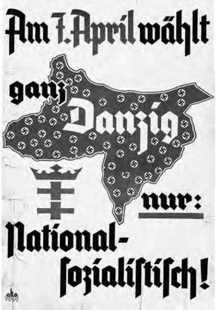 Wahlplakat der NSDAP zur Volkstagswahl in Danzig 1935. Die Machtergreifung erfolgte auch in Danzig 1933; Die "Wahl" war durch massive Einschüchterung und Betrug gekennzeichnet.